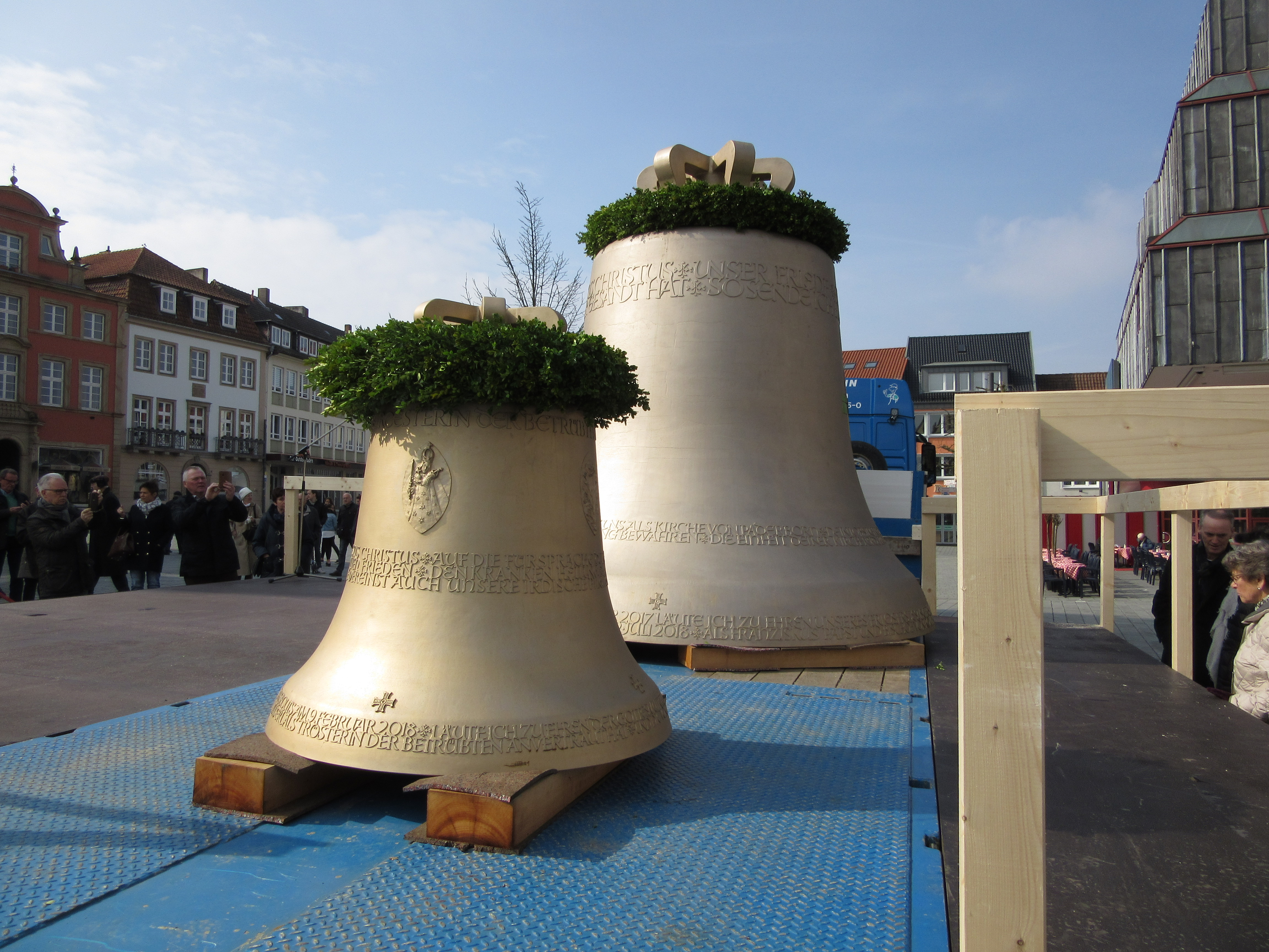 Paderborner Domglocken am Ostermontag (2. April 2018), Tag der Weihe